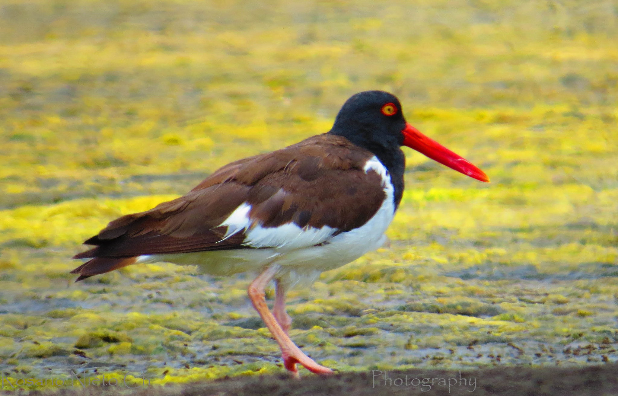 500px provided description: Fotos en las cercanias de Bucalemu,Yali y Puertecillo [#Gaviota ,#Yali ,#El Convento]